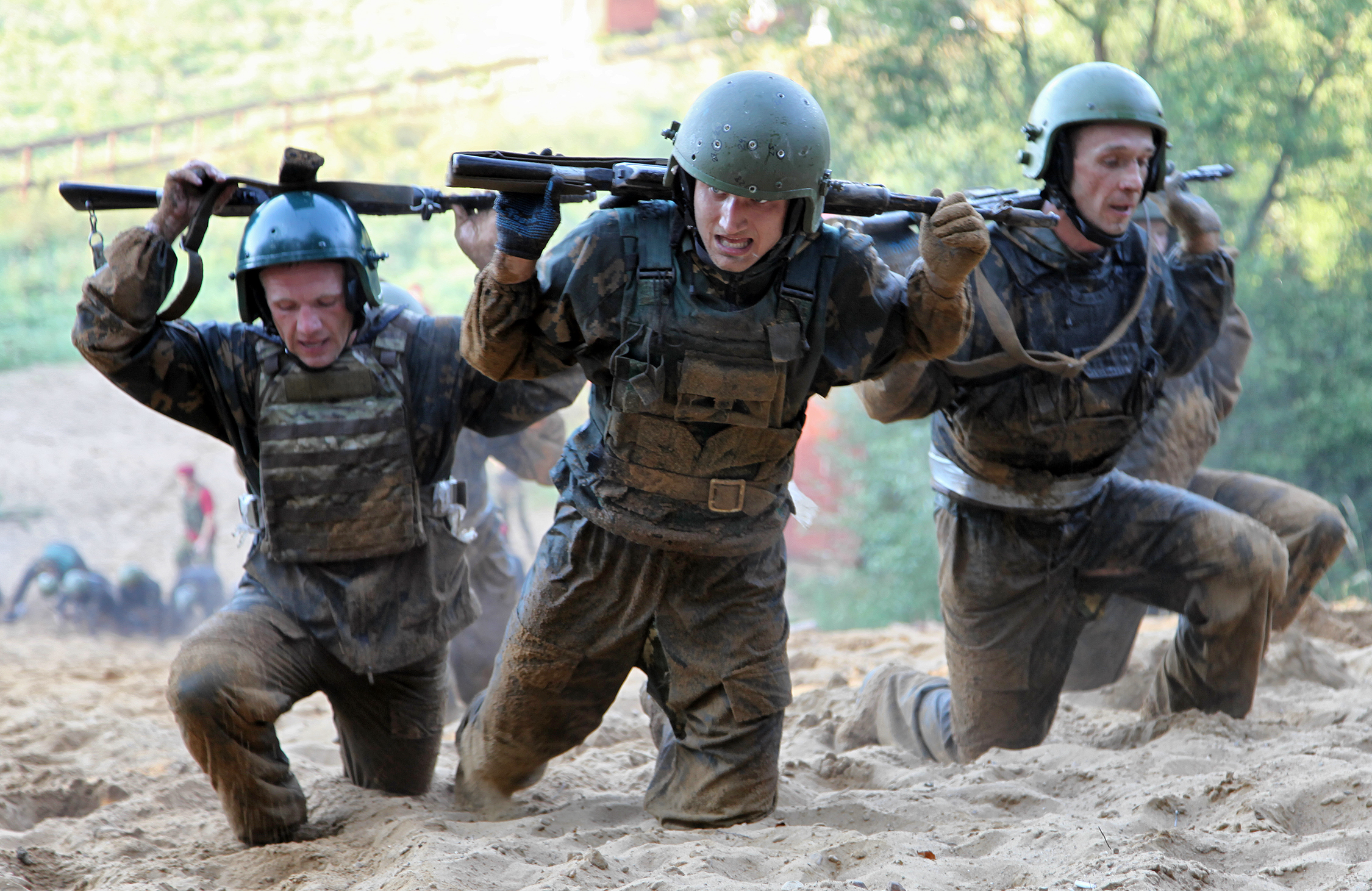 Преодоление кандидатами на получение крапового берета марш-броска